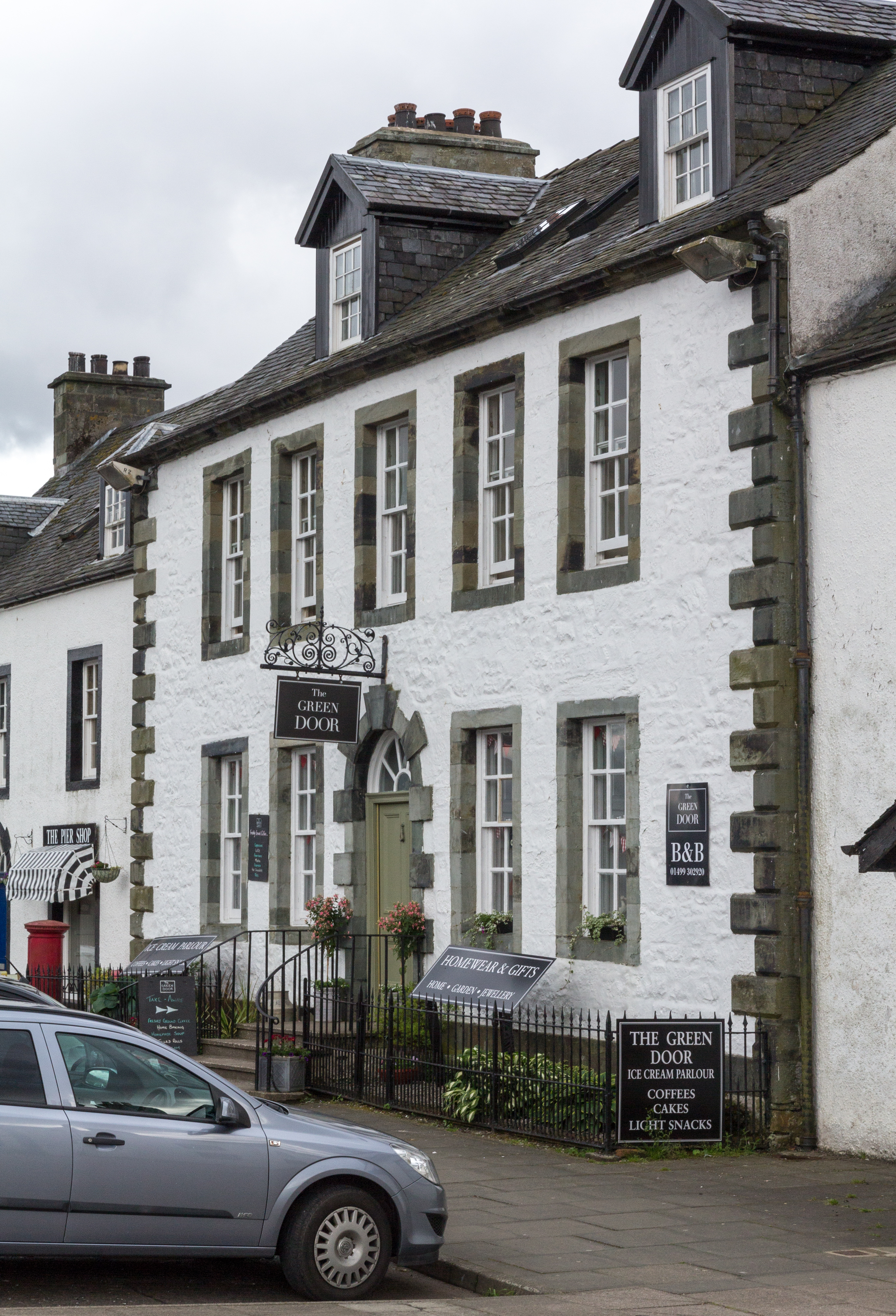 Gillies's house (the Green Door) in Inveraray